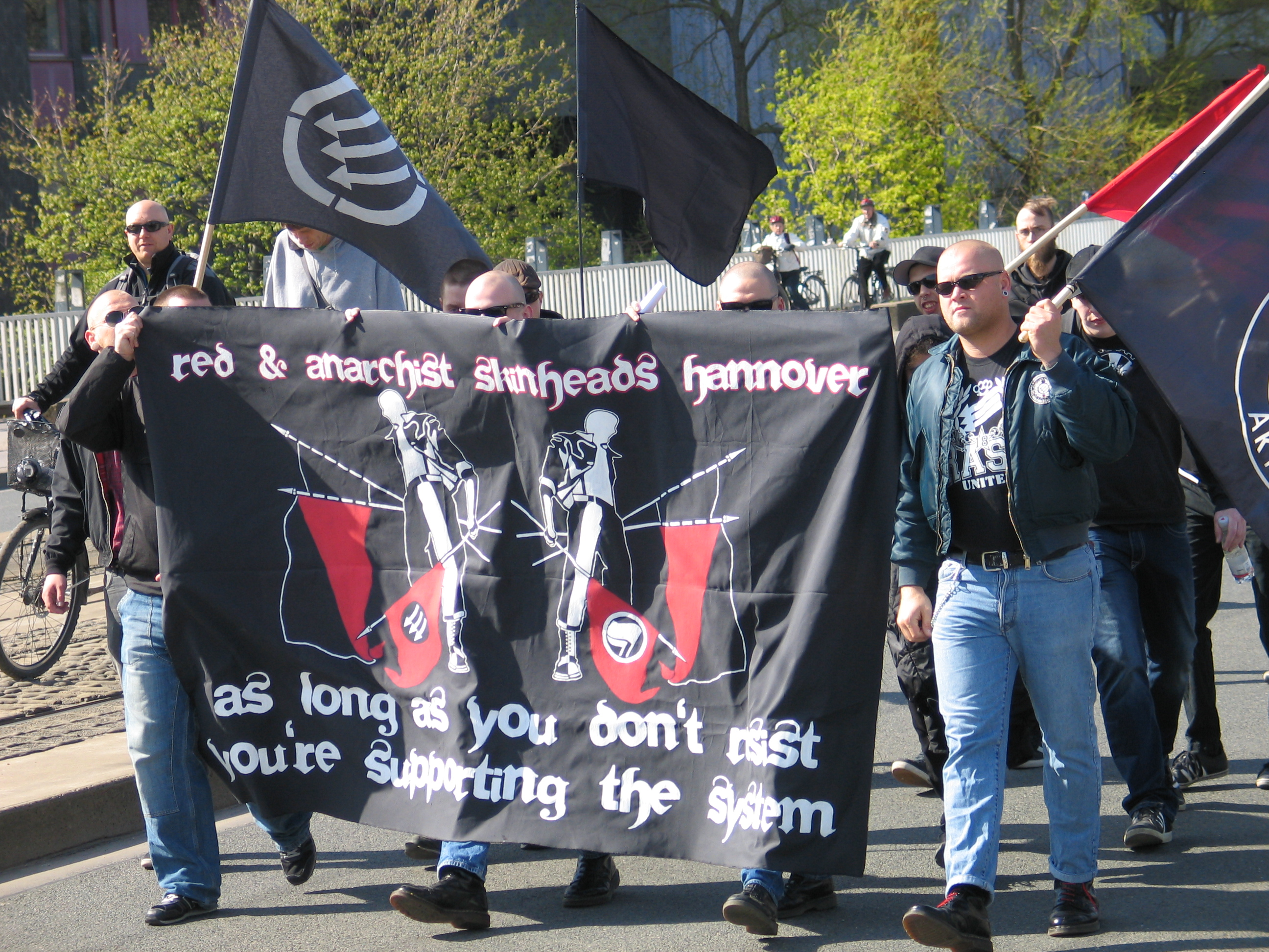 Unbearbeitetes, dafür zeitnah hochgeladenes Foto vom 1. Mai 2013 in Hannover: Der Deutsche Gewerkschaftsbund hatte zu den Demonstrationen unter dem Motto "Gute Arbeit. Sichere Rente. Soziales Europa" aufgerufen. Vielleicht letztmals zogen Demonstranten und unterschiedlichste Gruppierungen vom Freizeitheim Linden zum Klagesmarkt, den die Stadt Hannover im Zuge der Umbaumaßnahmen von Hannover City 2020 + demnächst mit Häusern bebauen will. Auch 2013 nahmen insbesondere Familien mit Kindern an den Feierlichkeiten teil und konnten vielleicht letztmals gleichzeitig in der Grünfläche des Gartendenkmals Alter St. Nikolai Friedhof Erholung finden ...